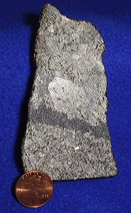 Platinina ruda.